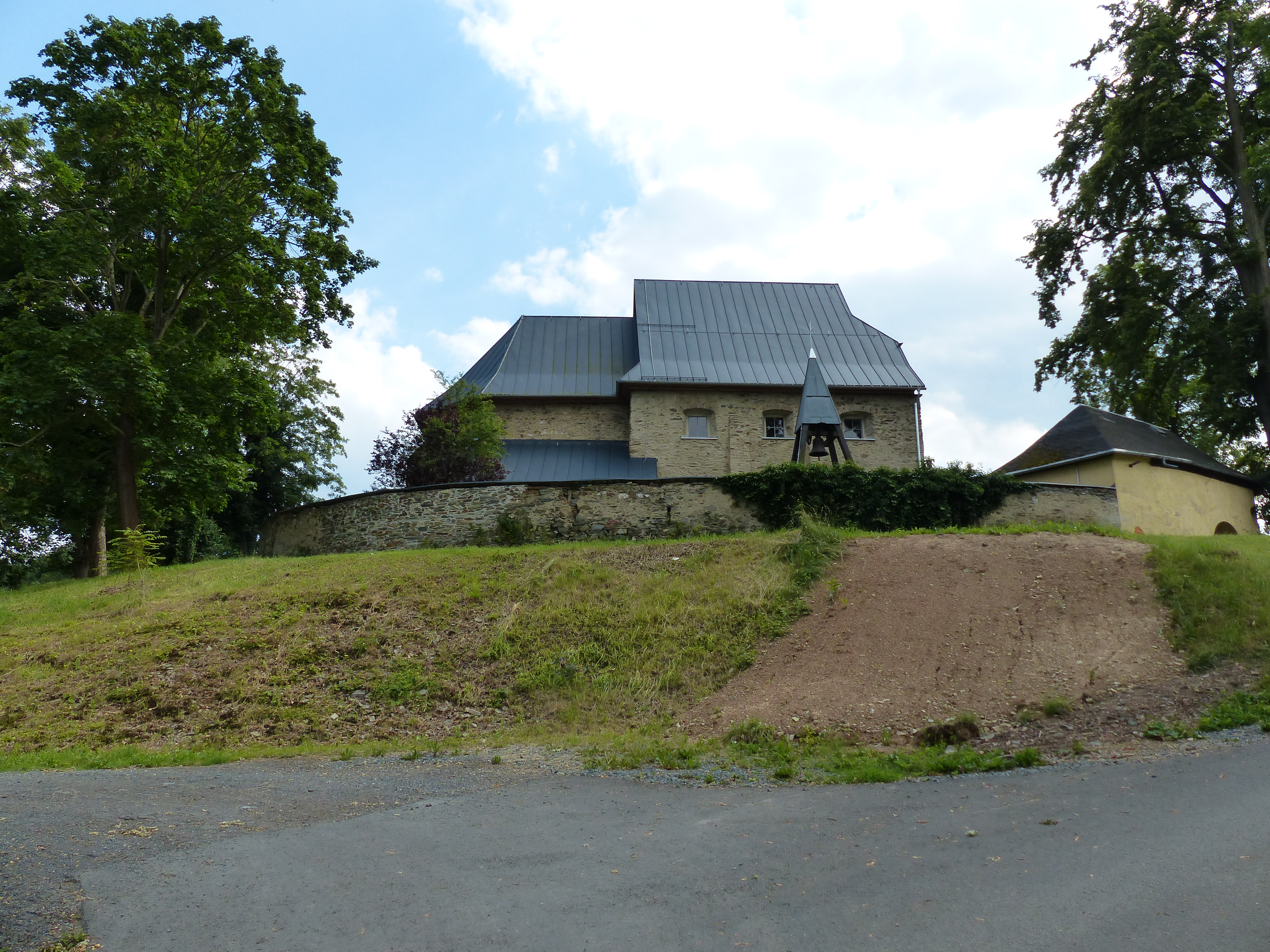 Bilderserie: Ansichten der Wehrkirche Triebel